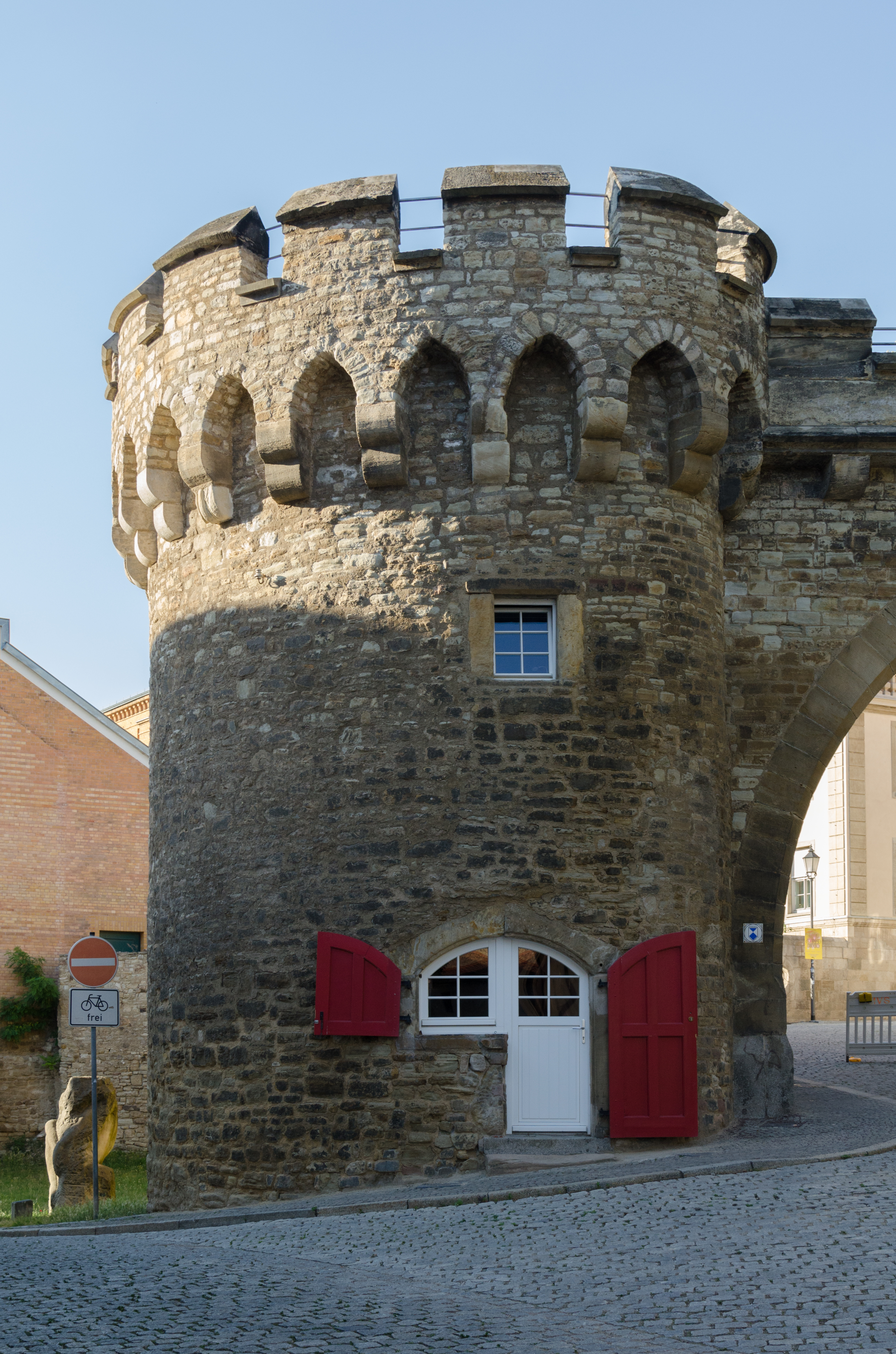 Merseburg, Domstraße, Domburgbefestigung, Krummes Tor